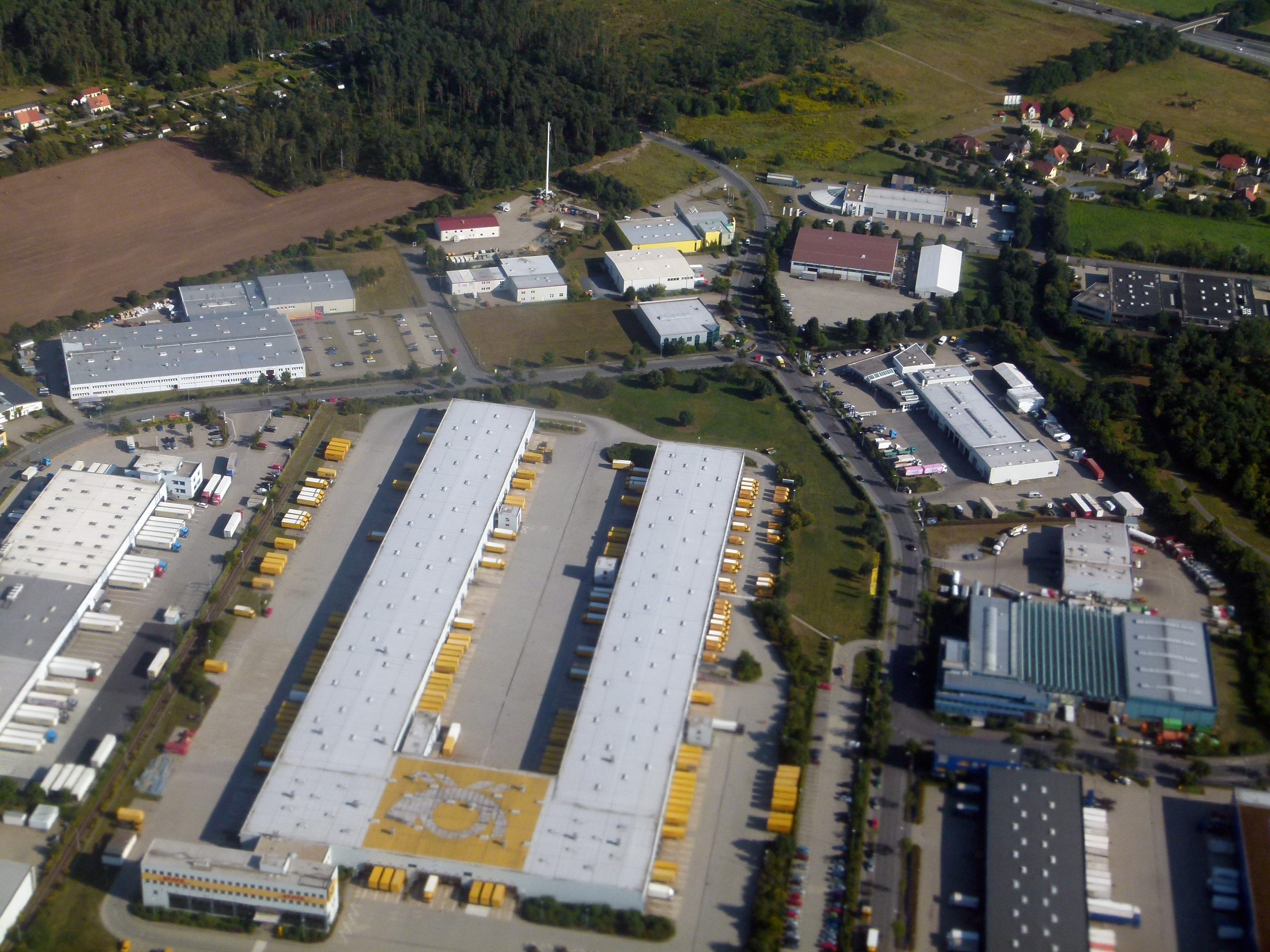 Gewerbegebiet Ottendorf-Okrilla, Sachsen. Alle Pakete für Dresden und den Landkreis Sächsische Schweiz - Osterzgebirge landen zuerst hier. Sobald das Paket hier ist, wird es in den Transporter geladen und zum Ziel gebracht. Es befindet sich an der Nordgrenze der Stadt Dresden.